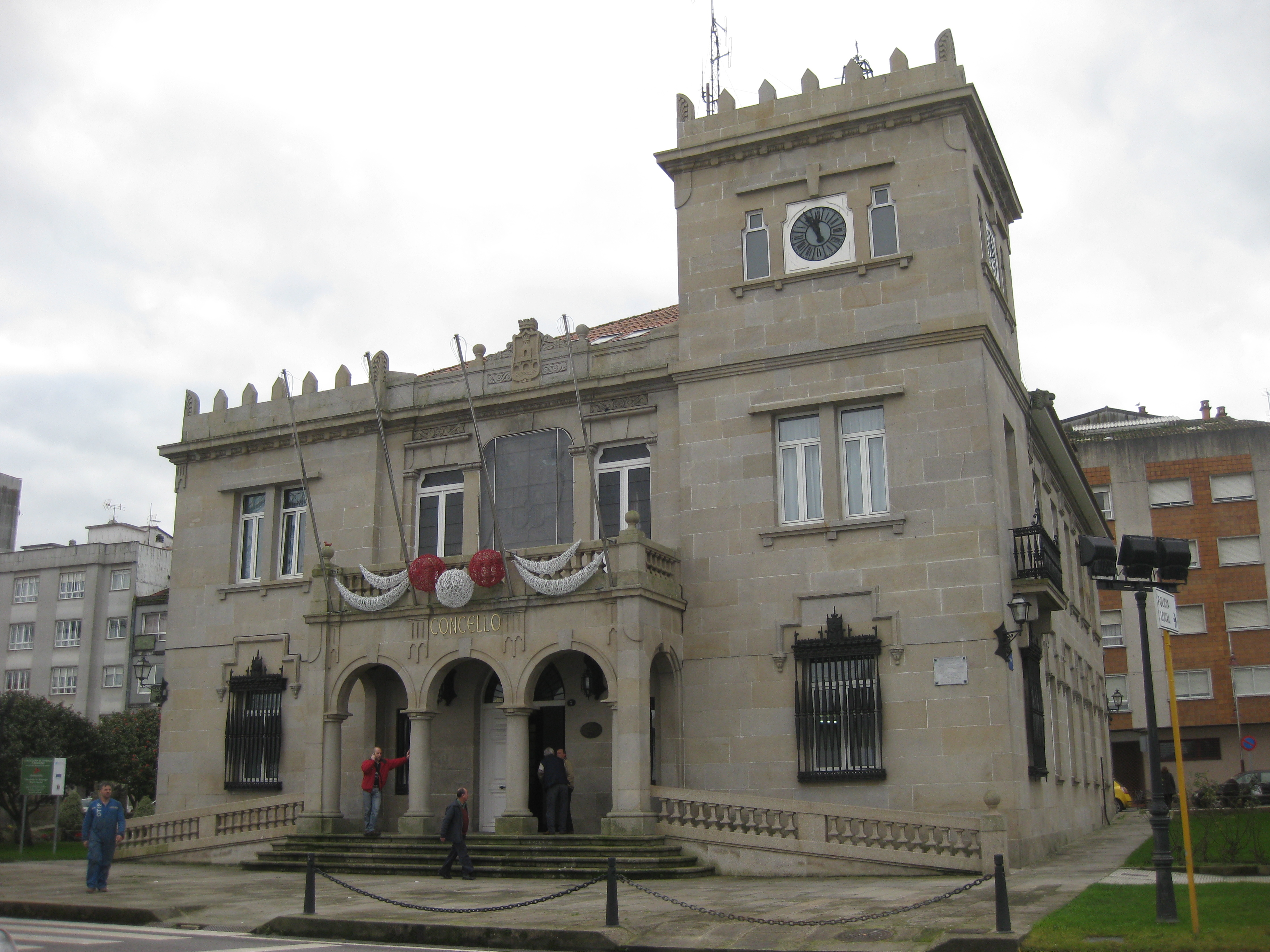 Casa do concello de Marín (Galiza).